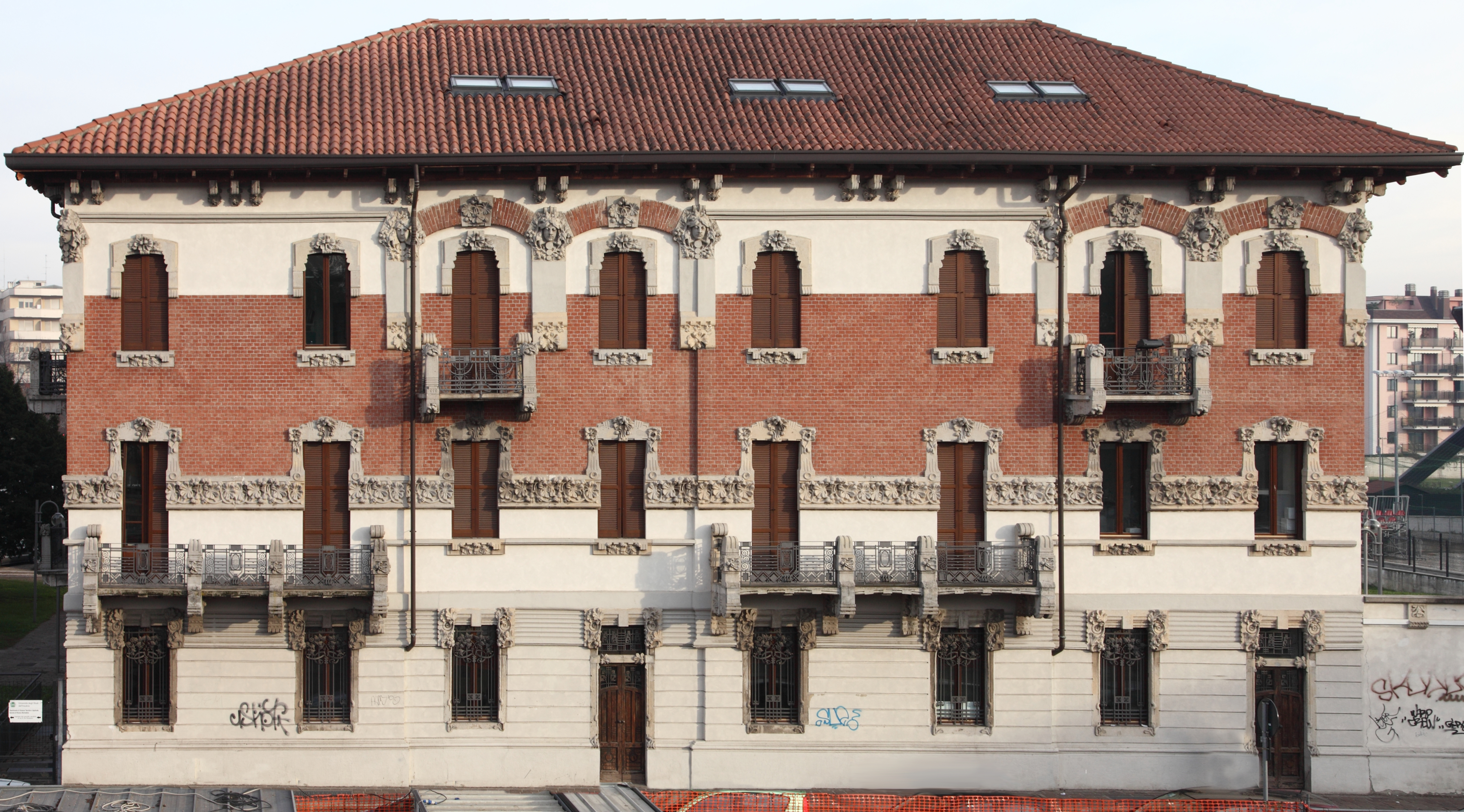 Villa Manara (ex casa Colombo) This is a photo of a monument which is part of cultural heritage of Italy.